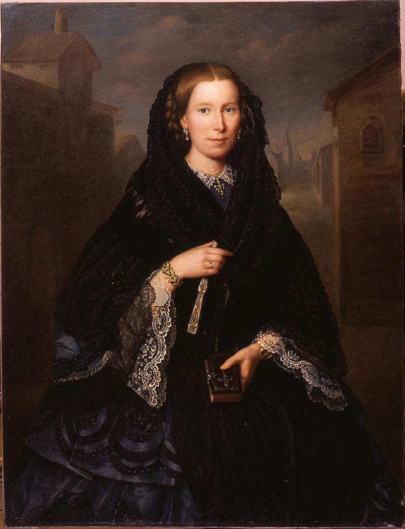 Retrato de Manuela Inocencia Serrano y Cerver (1816-1896), que fue marquesa consorte de Cerralbo por su matrimonio con Enrique de Aguilera y Gamboa, marqués de Cerralbo, conde de Alcudia y Grande de España. Pero antes había estado casada con el politico, hacendista y militar español Antonio María del Valle, con quien tuvo dos hijos.